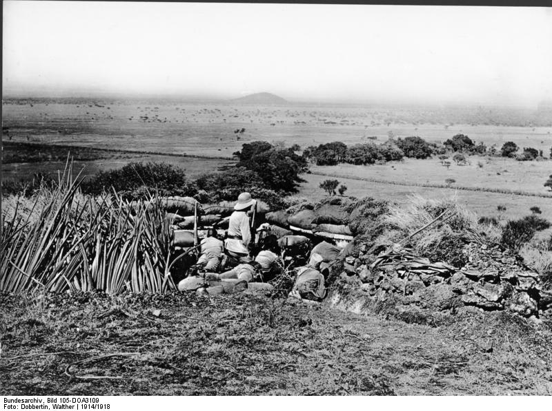 Gute Deckung